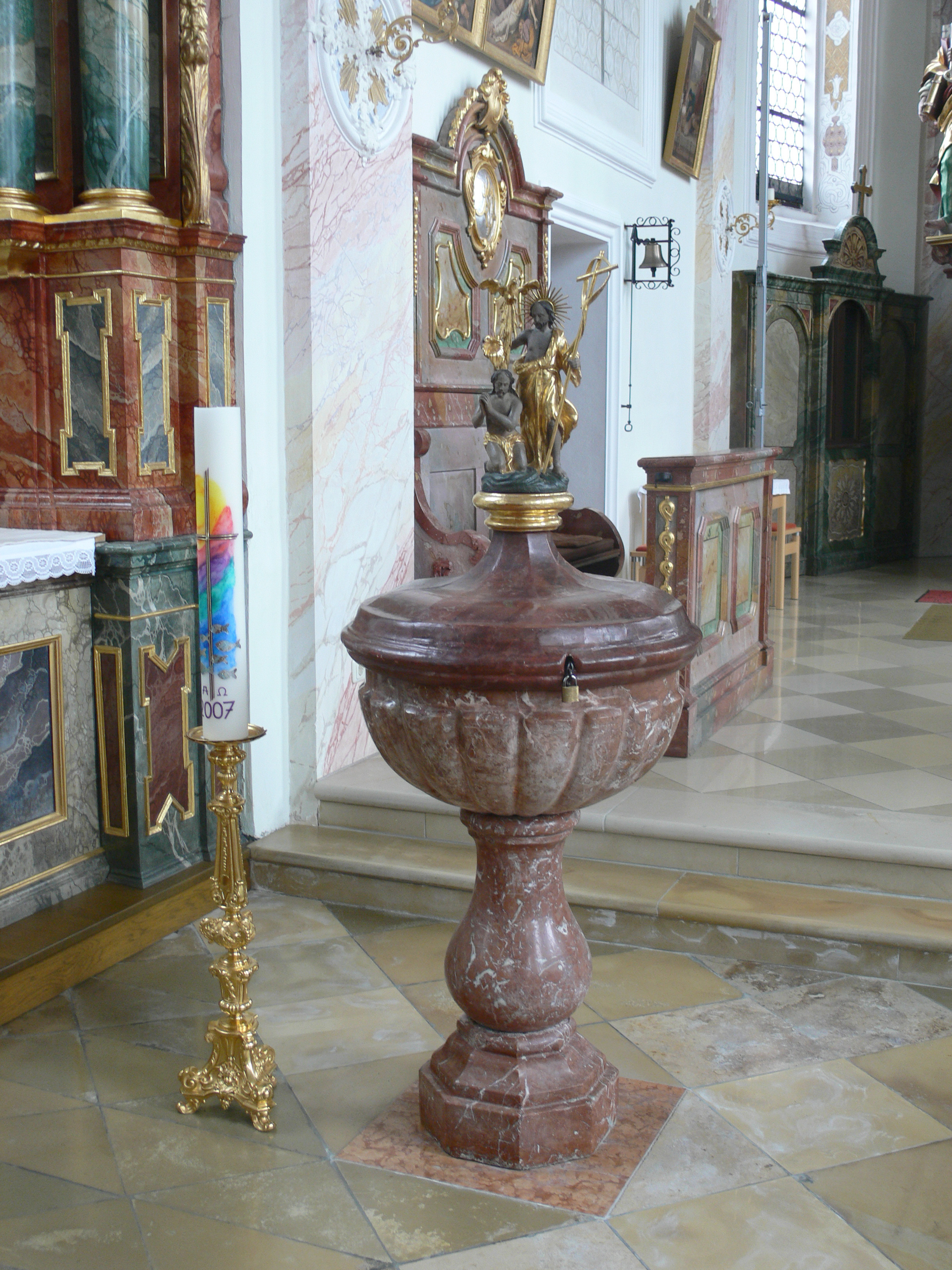 Pfarrkirche St. Peter und Paul, Benningen, Landkreis Unterallgäu, Taufstein und Osterleuchter